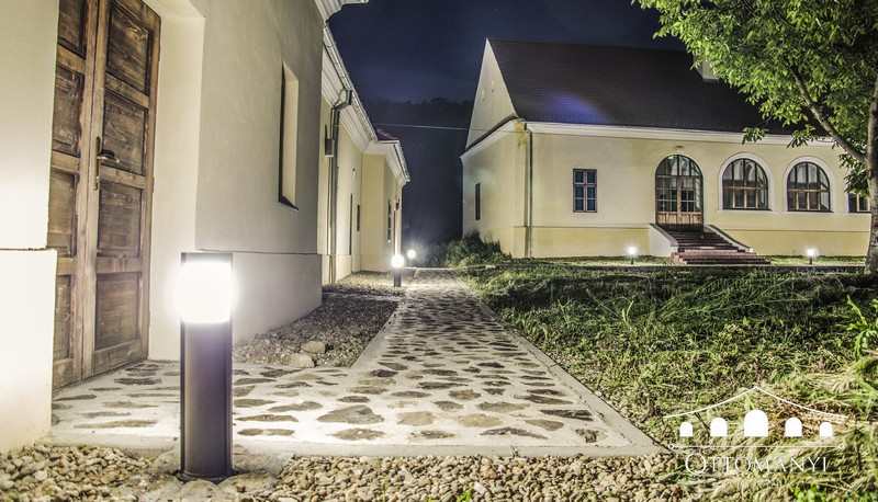 Conac-Curia Komarony